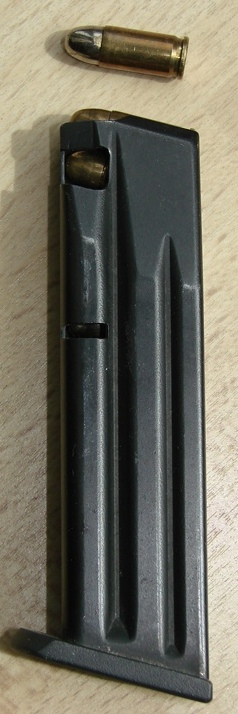 Beretta, CAT.5585 - MOD.81F - CAL. 7.65